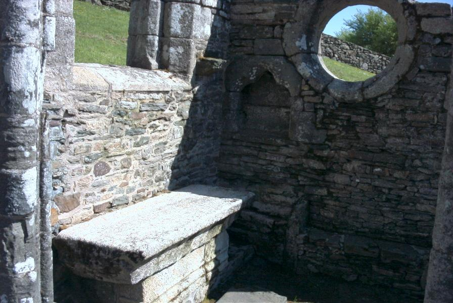 Chapelle de Languidou : chapelle sud